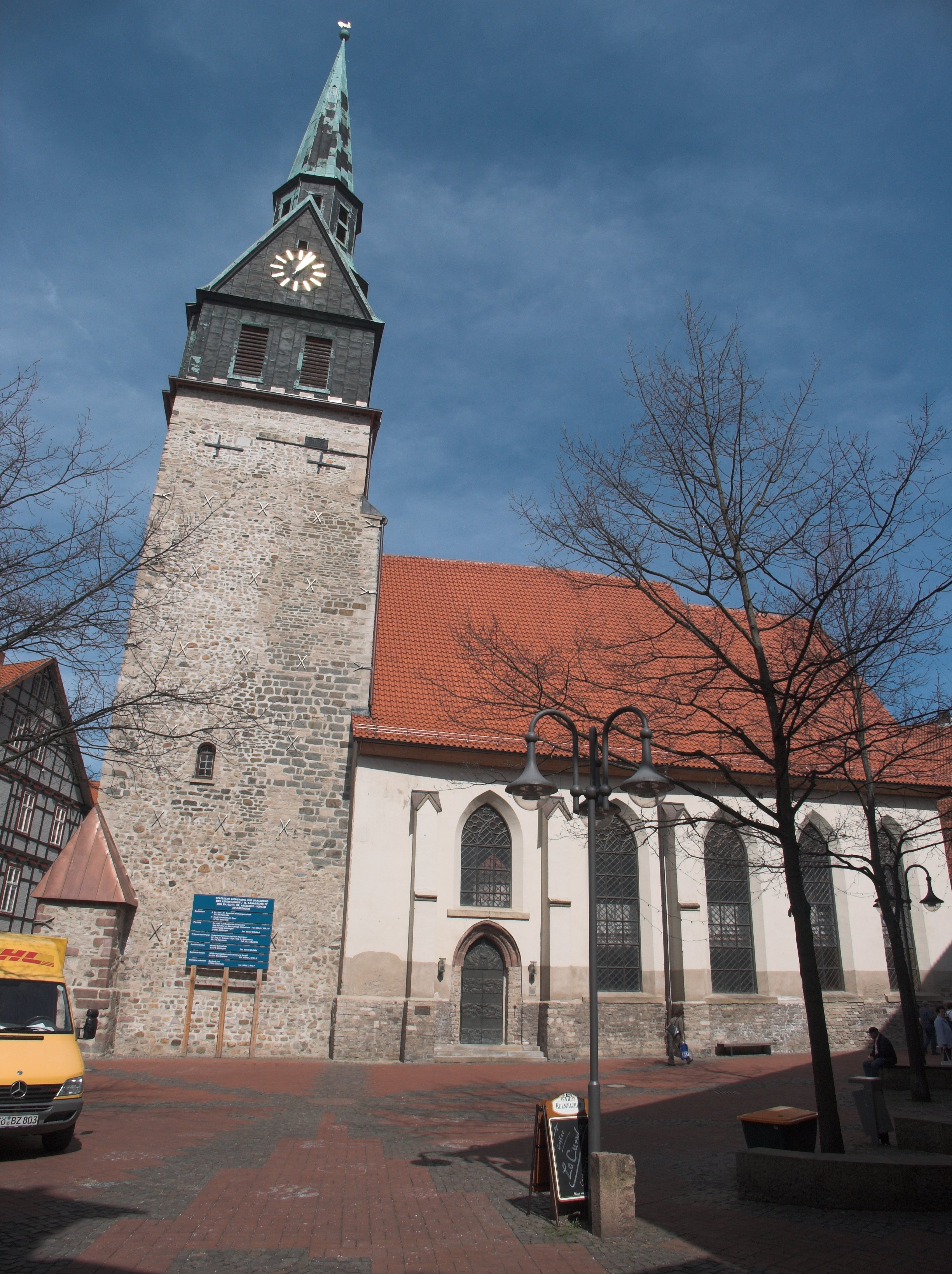 Kirche St. Aegidien am Kornmarkt in Osterode am Harz